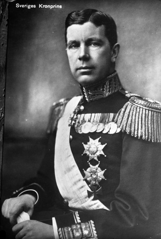 Sveriges Kronprins